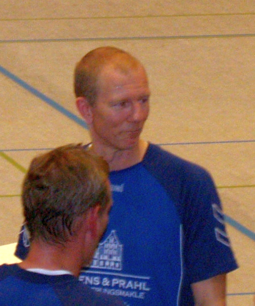 Pierre Thorsson, ein ehemaliger schwedischer Handballspieler